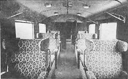 Innenausstattung der JDŽ-Schmalspurtriebzüge Reihe 801 mit komfortabler 1+1-Bestuhlung